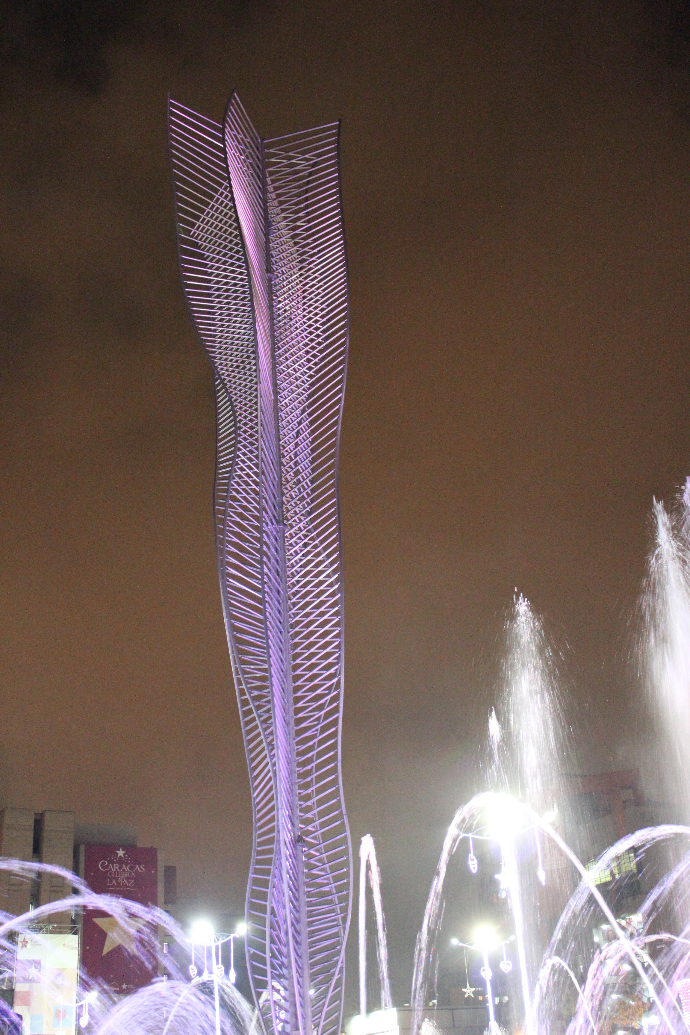 Plaza Diego Ibarra, Centro de Caracas. Venezuela